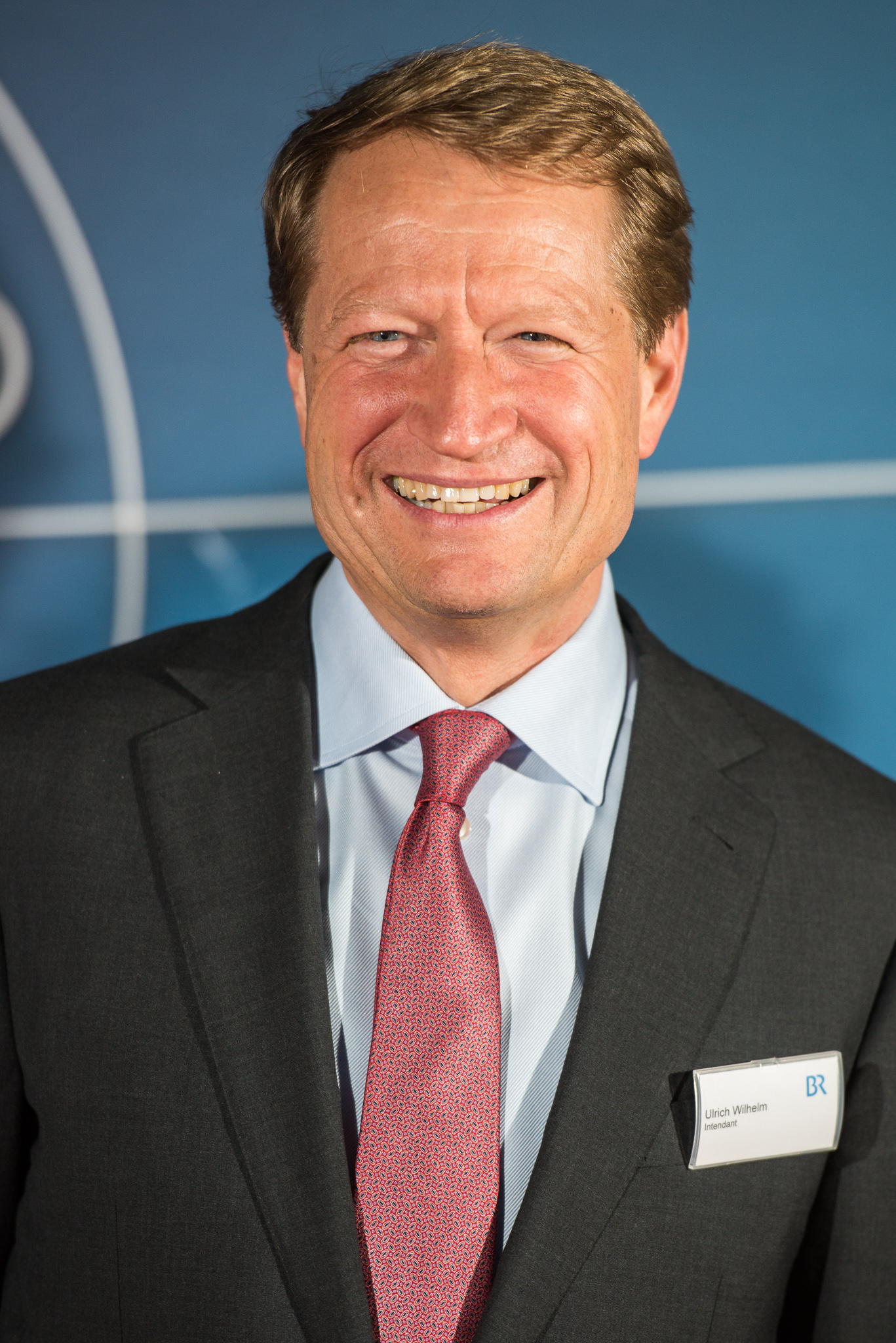 Am Ende geht man nackt,BR,BR im Gespräch,Bayerischer Rundfunk,Franken-Tatort,Intendant BR,Preview,Tatort,Ulrich Wilhelm